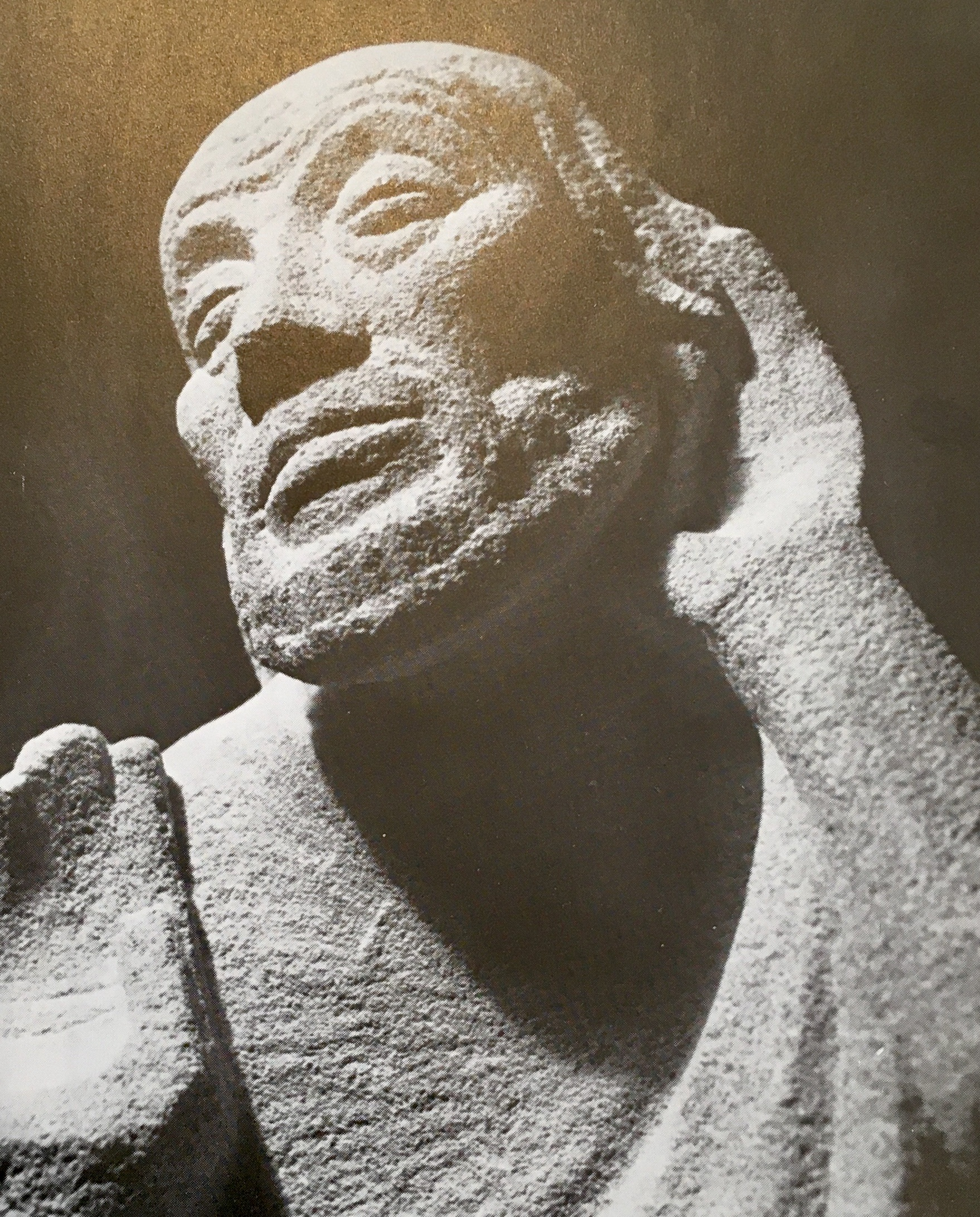 Skulptur aus Quarizt, gefertigt von Ludwig Manz für St. Leonhard Nürnberg, 1985